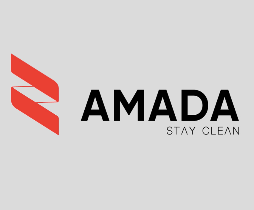 Логотип агентства АМАДА